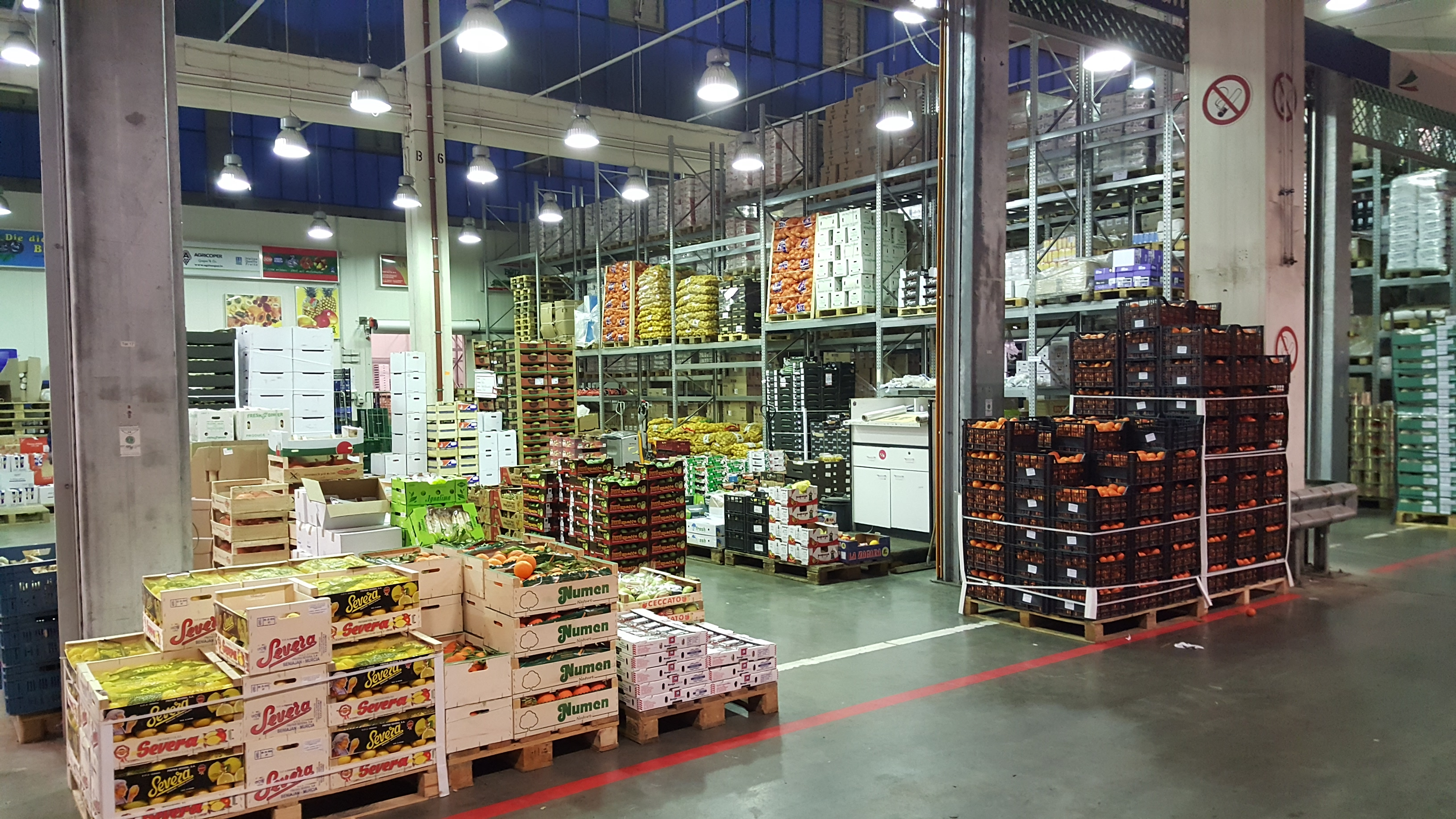 Mehr als 220.000 Tonnen Waren werden jährlich auf dem Fruchthof Berlin umgeschlagen